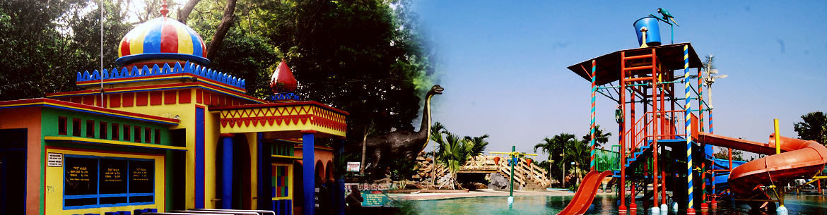 Wisata buatan Kabubaten Nganjuk